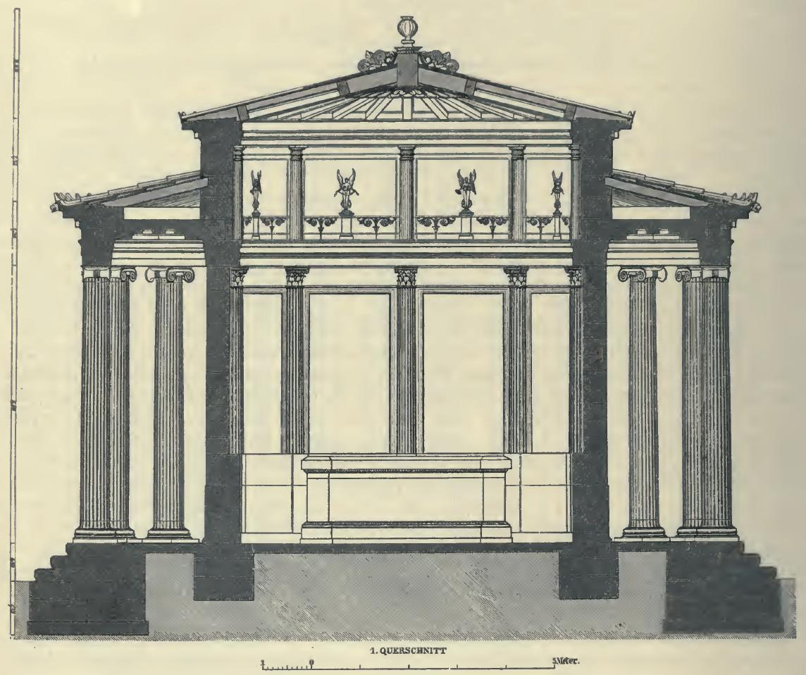 Querfchnitt durch das Philippeion zu Olympia.